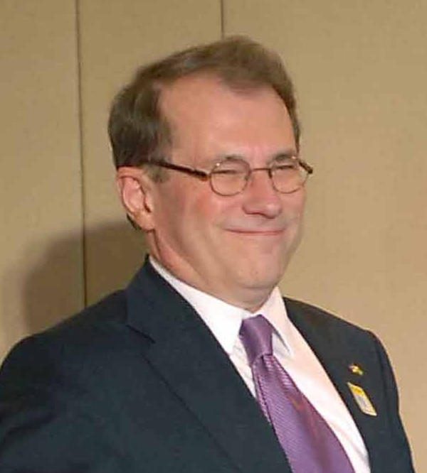 Brasília - Presidente do Parlamento da Suécia, Per Westerberg, reúne-se com presidente Lula no Palácio do Planalto.